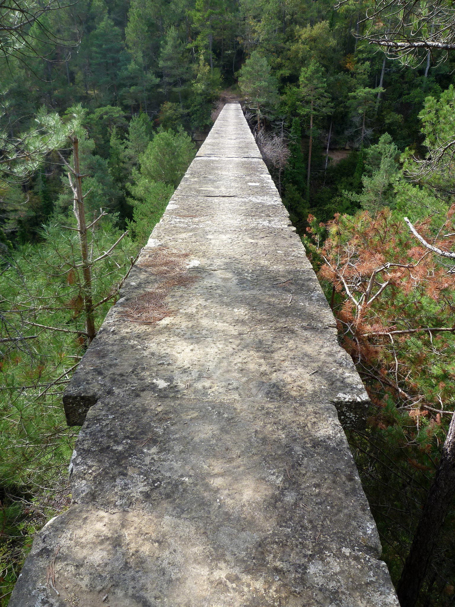 Pont de la Frau (Lladurs): Coberta del pont